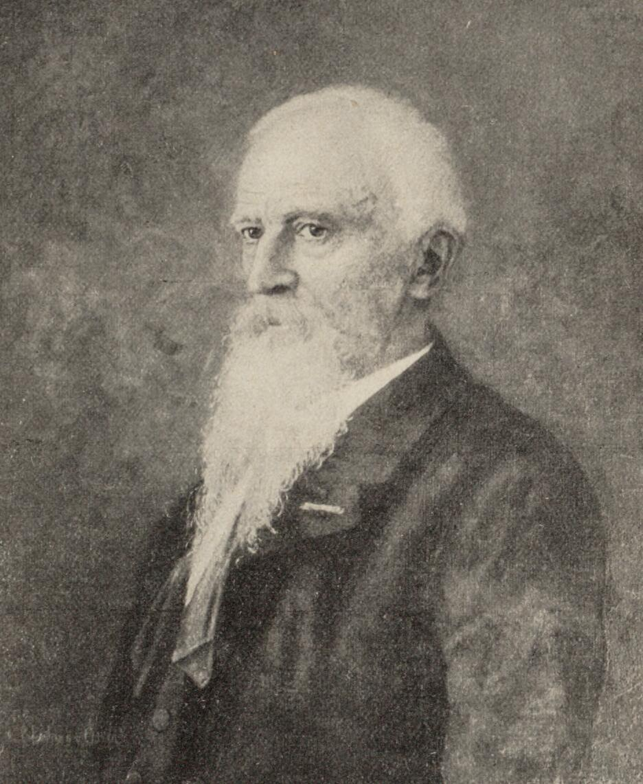 Portret van Daniel de Lange (1841-1918) , violoncellist; dirigent; componist; medeoprichter en directeur van het Conservatorium Amsterdam. Door Adri Bleuland van Oordt